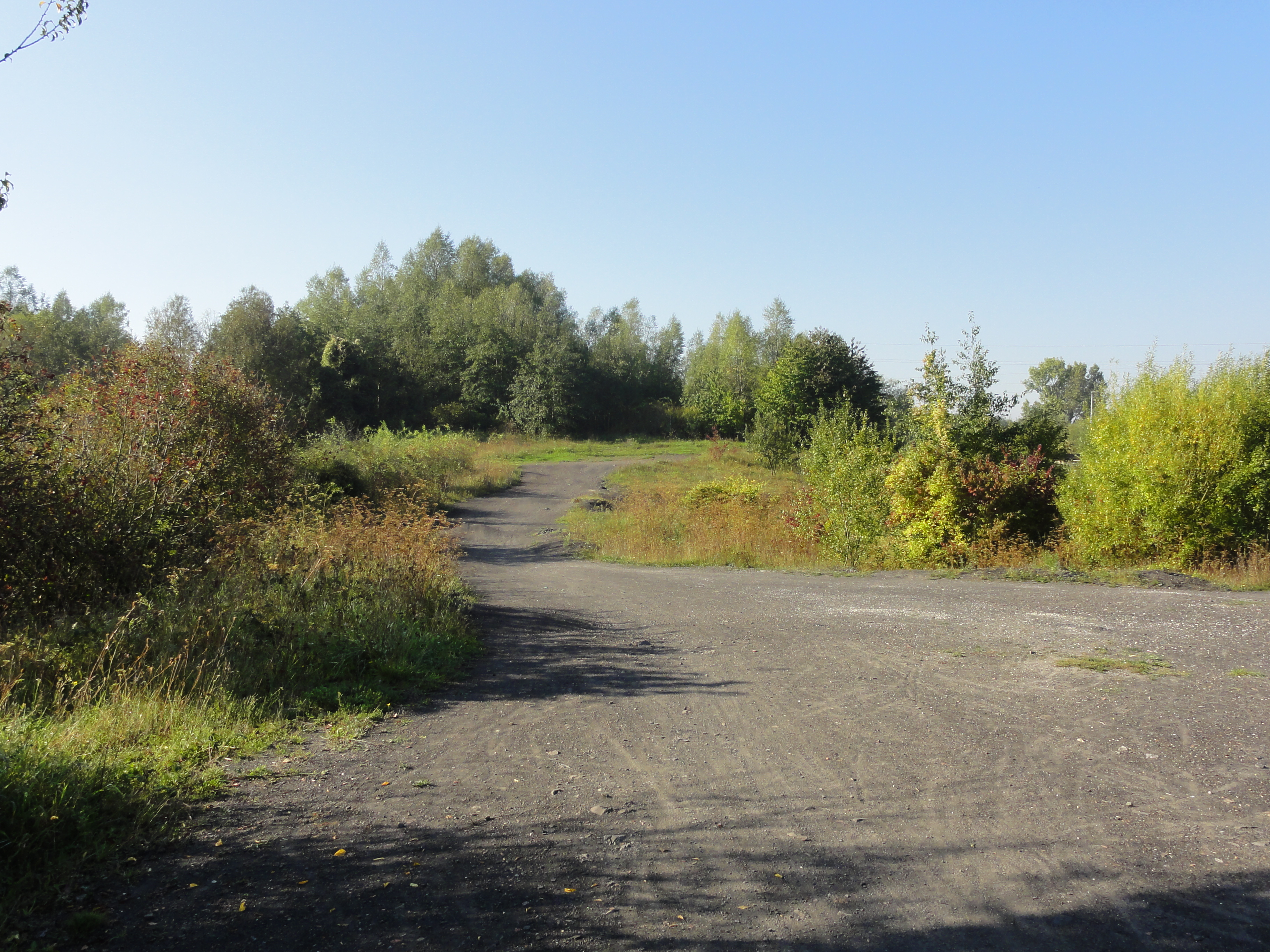 Terril n° 259 dit Centrale électrique de Gosnay, centrale thermique de Gosnay de la Compagnie des mines de Bruay dans le bassin minier du Nord-Pas-de-Calais, Gosnay et Bruay-la-Buissière, Pas-de-Calais, Nord-Pas-de-Calais, France.